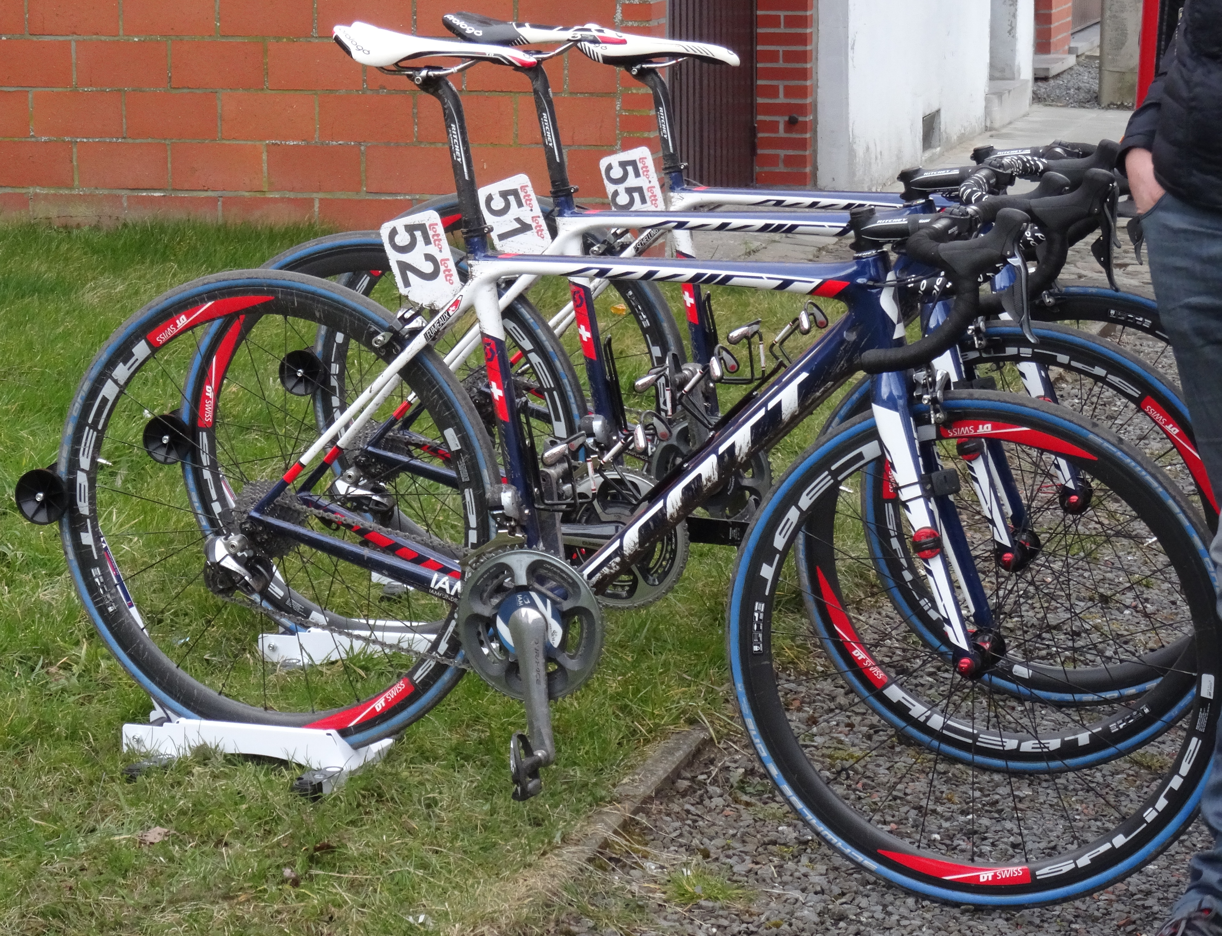 Le Samyn 2015, Dour...